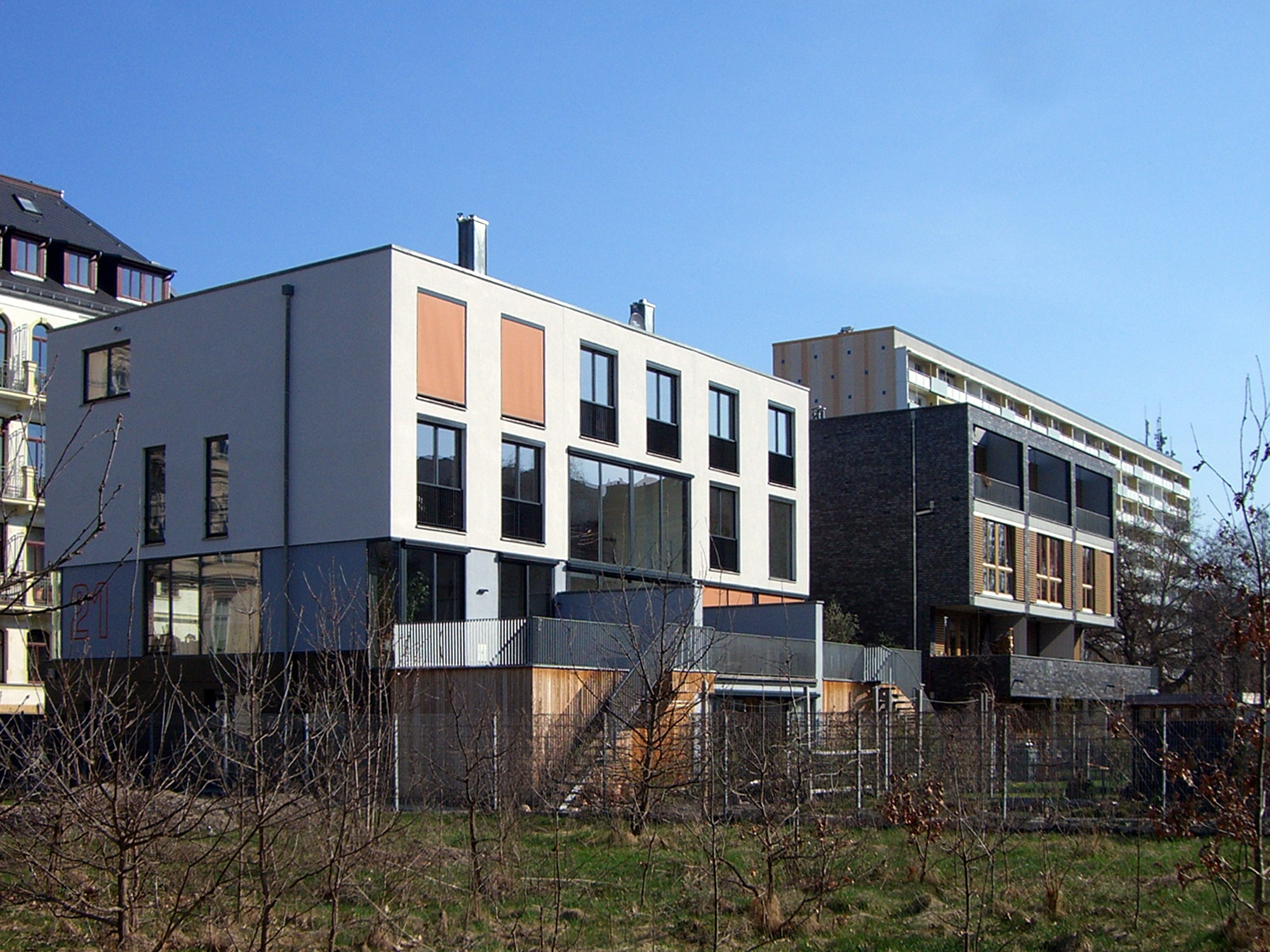 Wohnbauten in der Haydnstraße in Leipzig